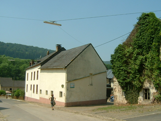 Ammeldingen an der Our, (Eifel), Bauernhofgebäude aus dem 17. Jahrhundert